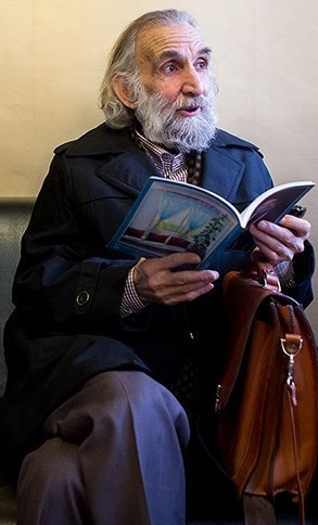 جشن تولد هنرمندان پیشکسوت متولد ماه آذر